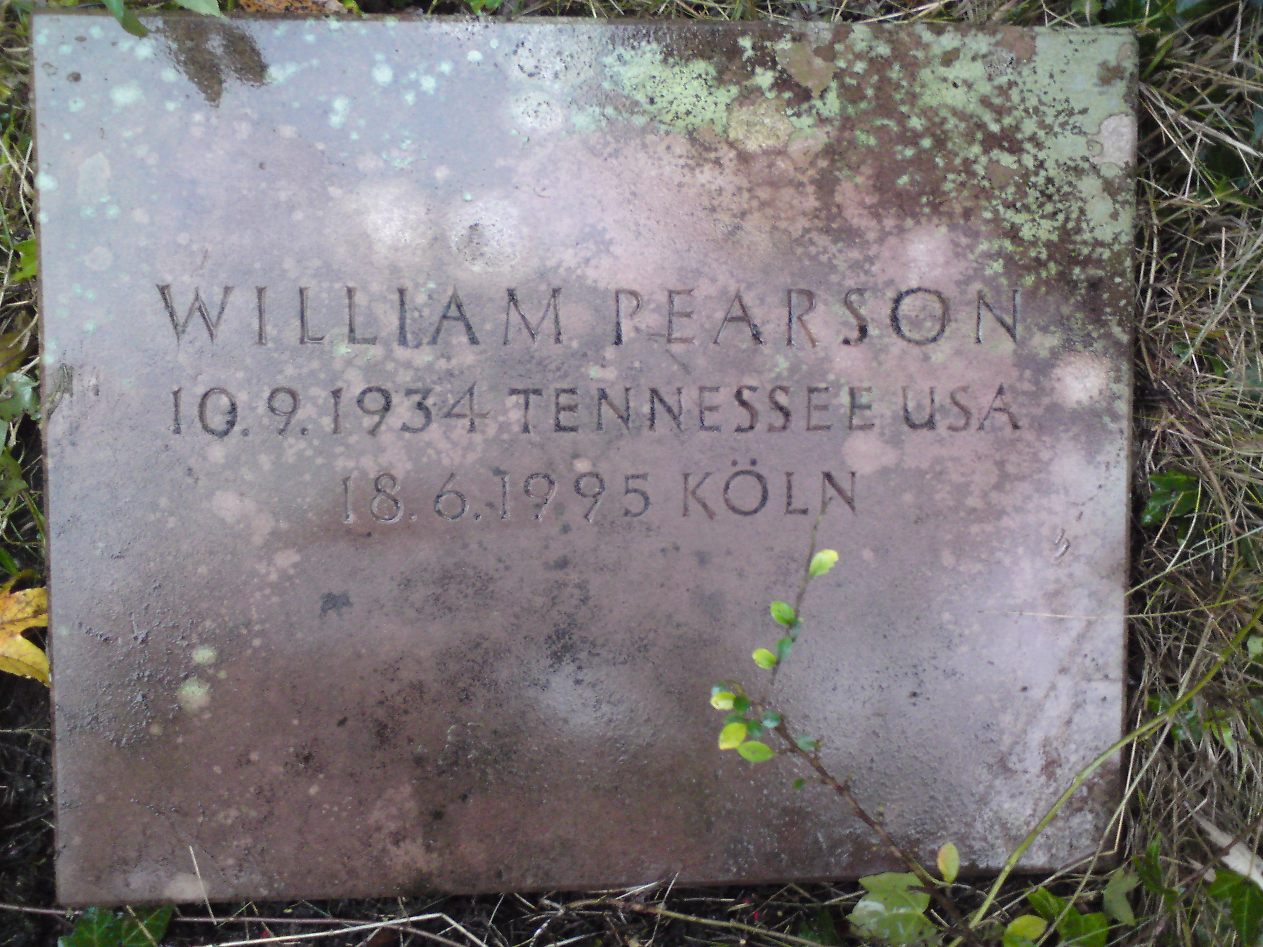 Melatenfriedhof Köln